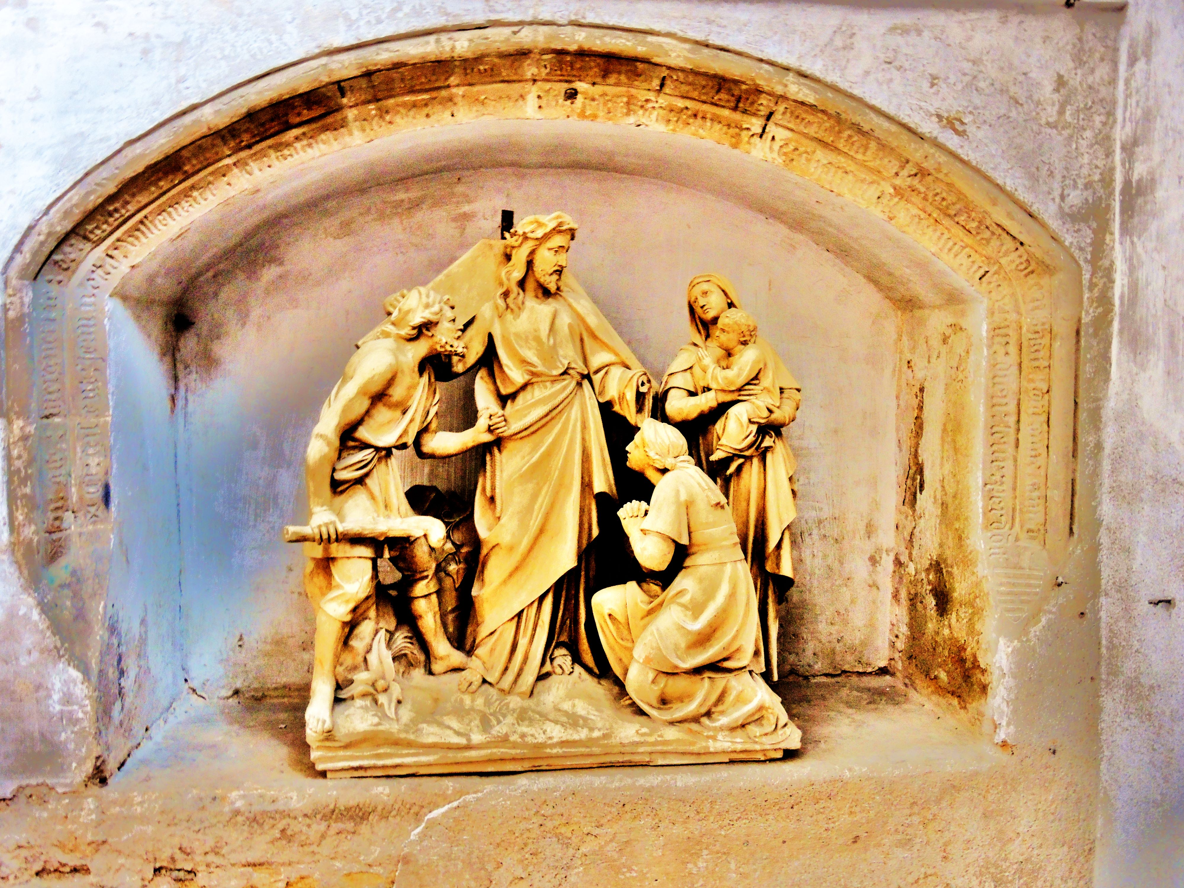 Enfeu et groupe sculpté, dans l'église abbatiale de Faverney.